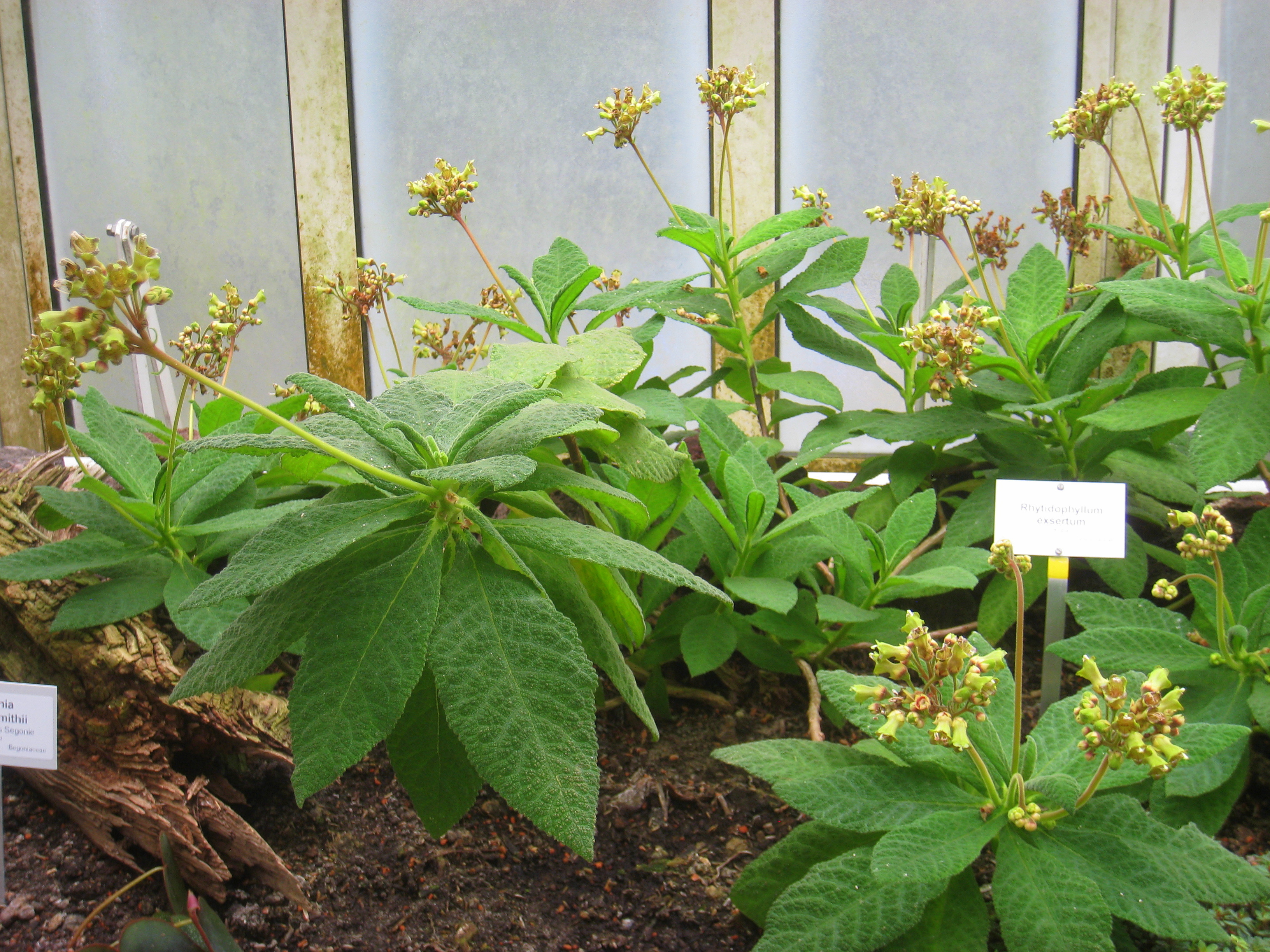 Rhytidophyllum exsertum specimen in the Botanischer Garten, Berlin-Dahlem (Berlin Botanical Garden), Berlin, Germany.